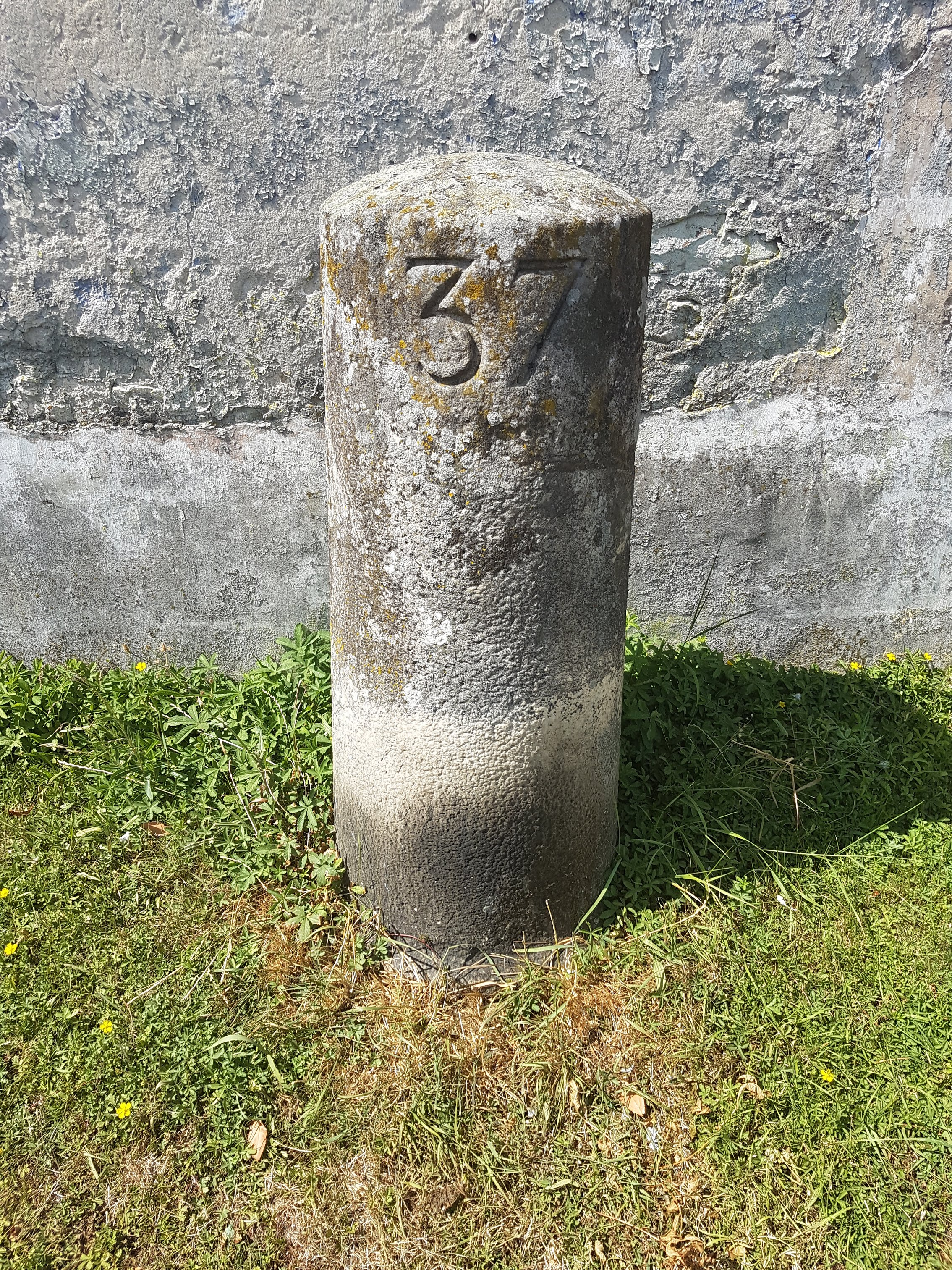 Borne fleurdelysée n°37, son socle recouvert d'herbes.